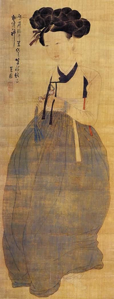 미인도(美人圖), 서울 성북구에 위치한 간송미술관 소장.